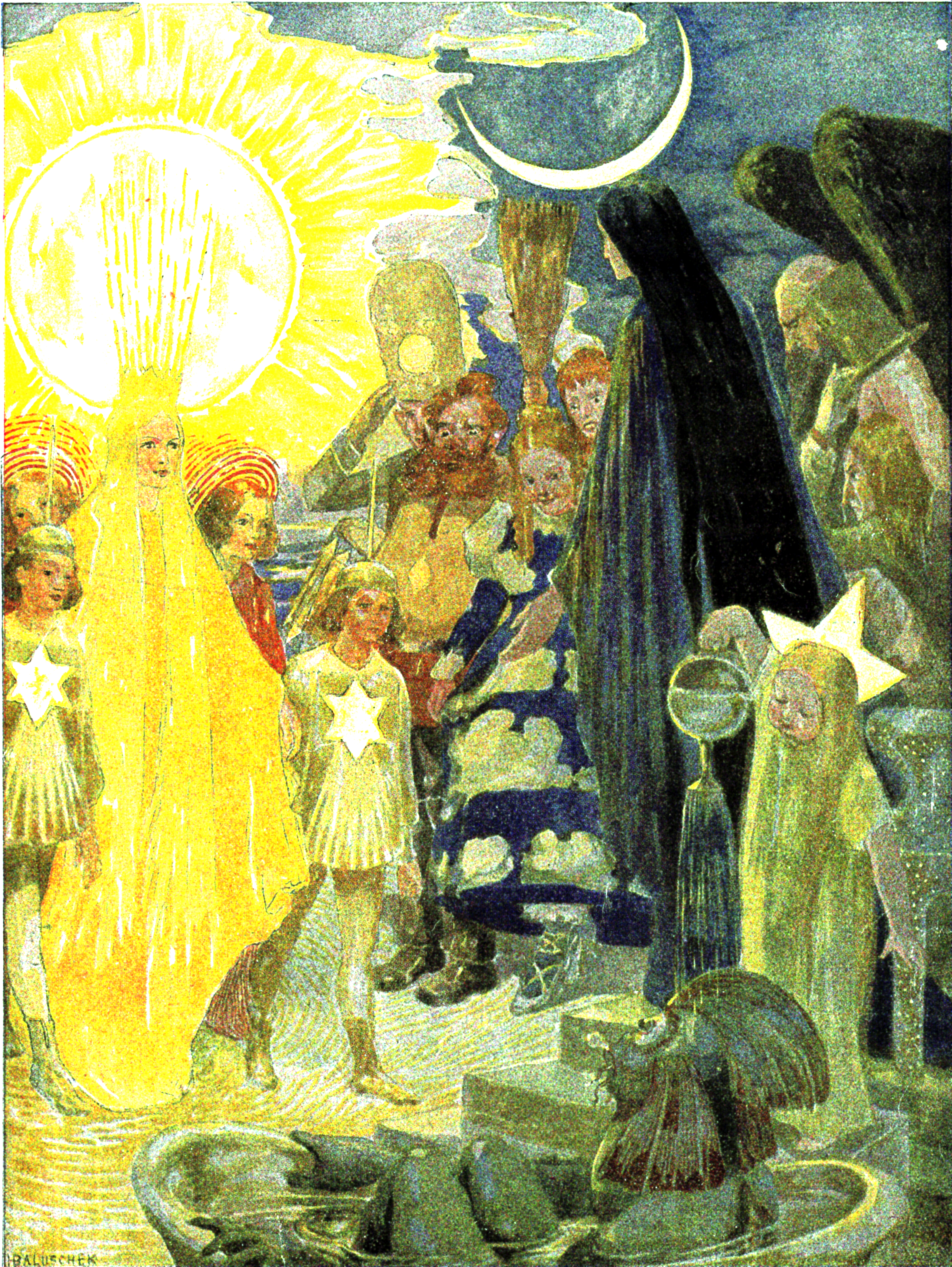 Peterchens_Mondfahrt_-_Gemälde_S._52__-,_Das_Schloss_der_Nachtfee,_engl._The_Palace_of_the_Night_Fairy